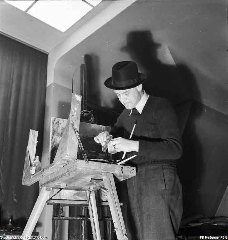 Der Berner Kunstmaler Fritz (Friedrich) Traffelet